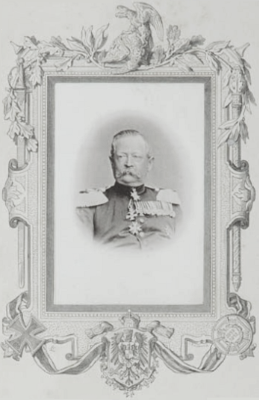 General Louis (Carl Friedrich Wilhelm Lewin) von Rothmaler, geb. 6. September 1814 in Teistungen, gest. 20. Mai 1884 in Erfurt. Königlich preußischer General der Infanterie aus 1715 reichsgeadeltem Geschlecht. 1864 Teilnahme am Feldzug gegen Dänemark, hier als General-Major, Führer der 7. Division.